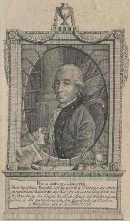 Franz Ludwig von Cancrin (1738–1816), deutscher Ingenieur, Mineraloge, Metallurg und Baumeister